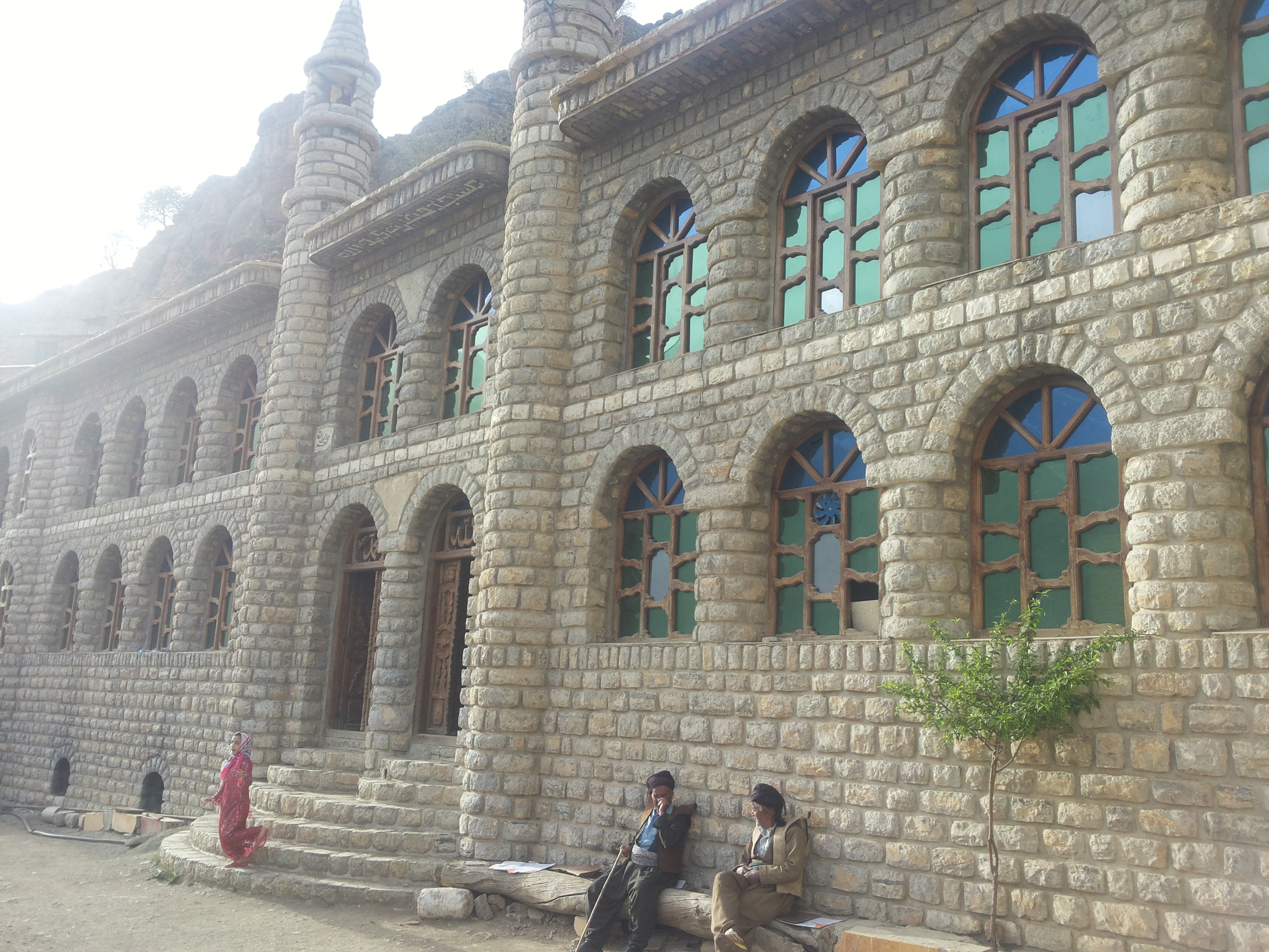 کوردی: مزگەوتی هەورامان